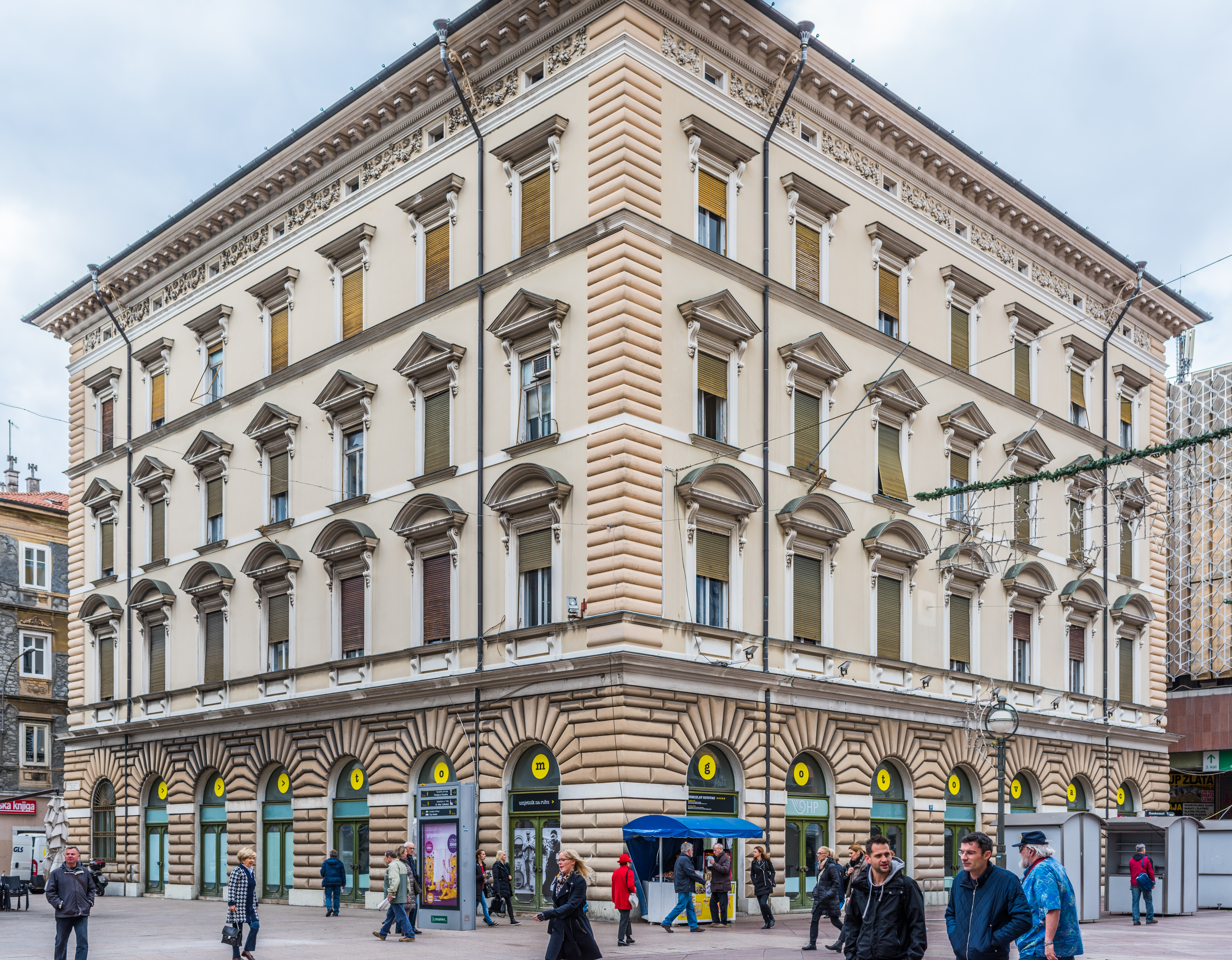 Rijeka Croatia November 2017